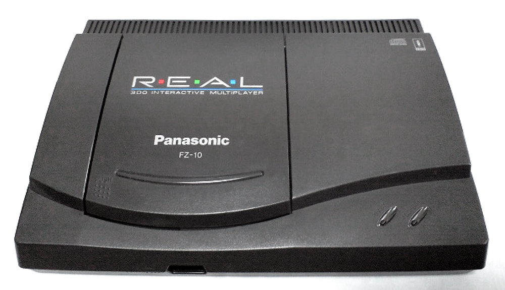 松下電器産業、3DO REAL II